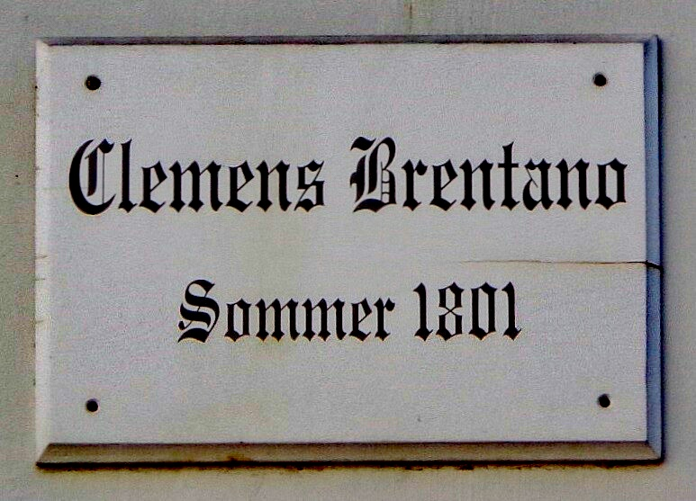 Göttinger Gedenktafel für Clemens Brentano, Dichter (Weender Straße 30)